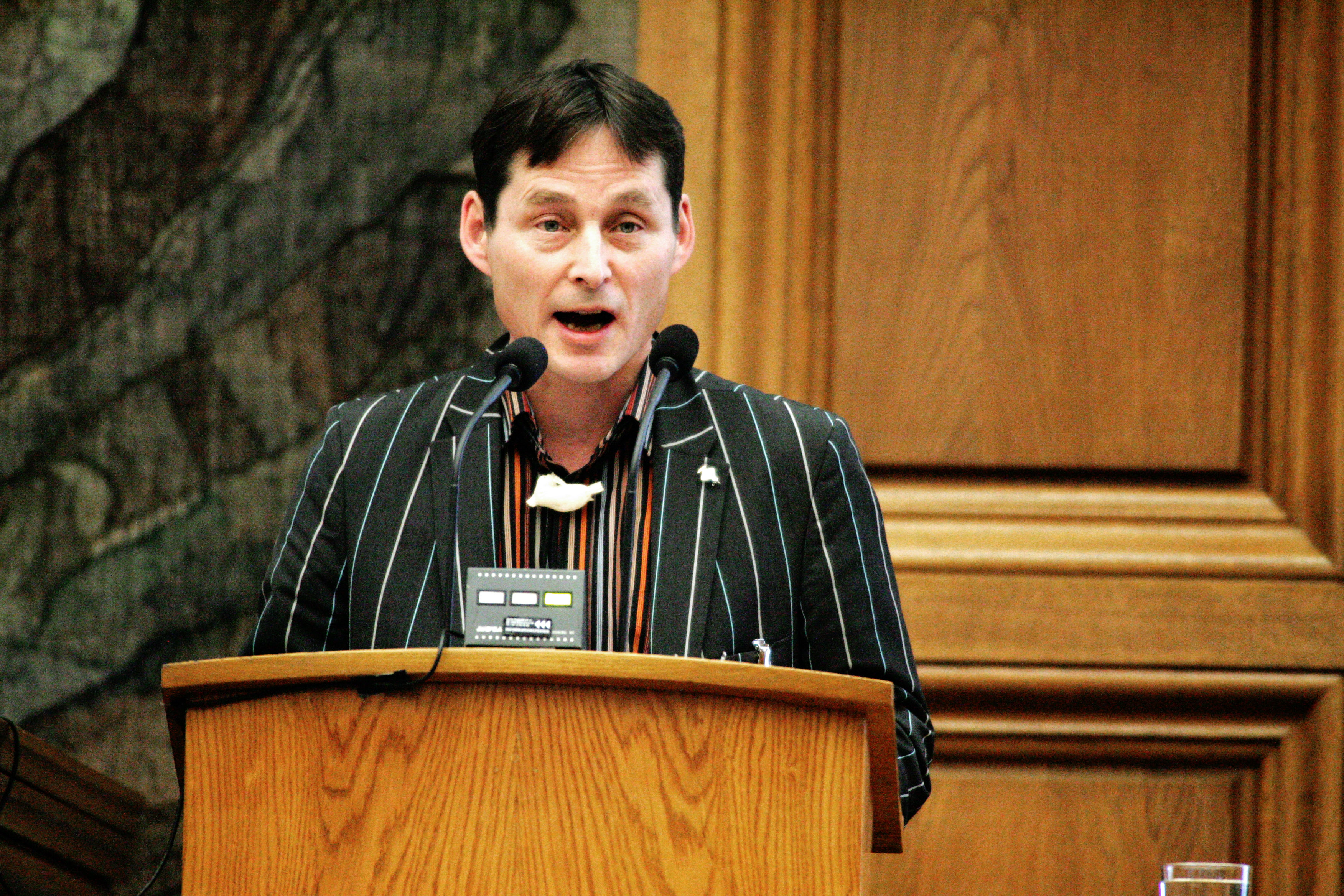 Johan Lund Olsen (IA) talar under Nordiska rådets session i Köpenhamn 2006.